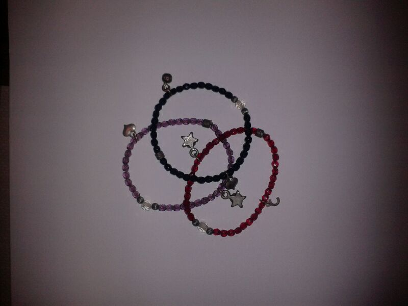 Són braçalets propis per a una entrada en Viquipèdia